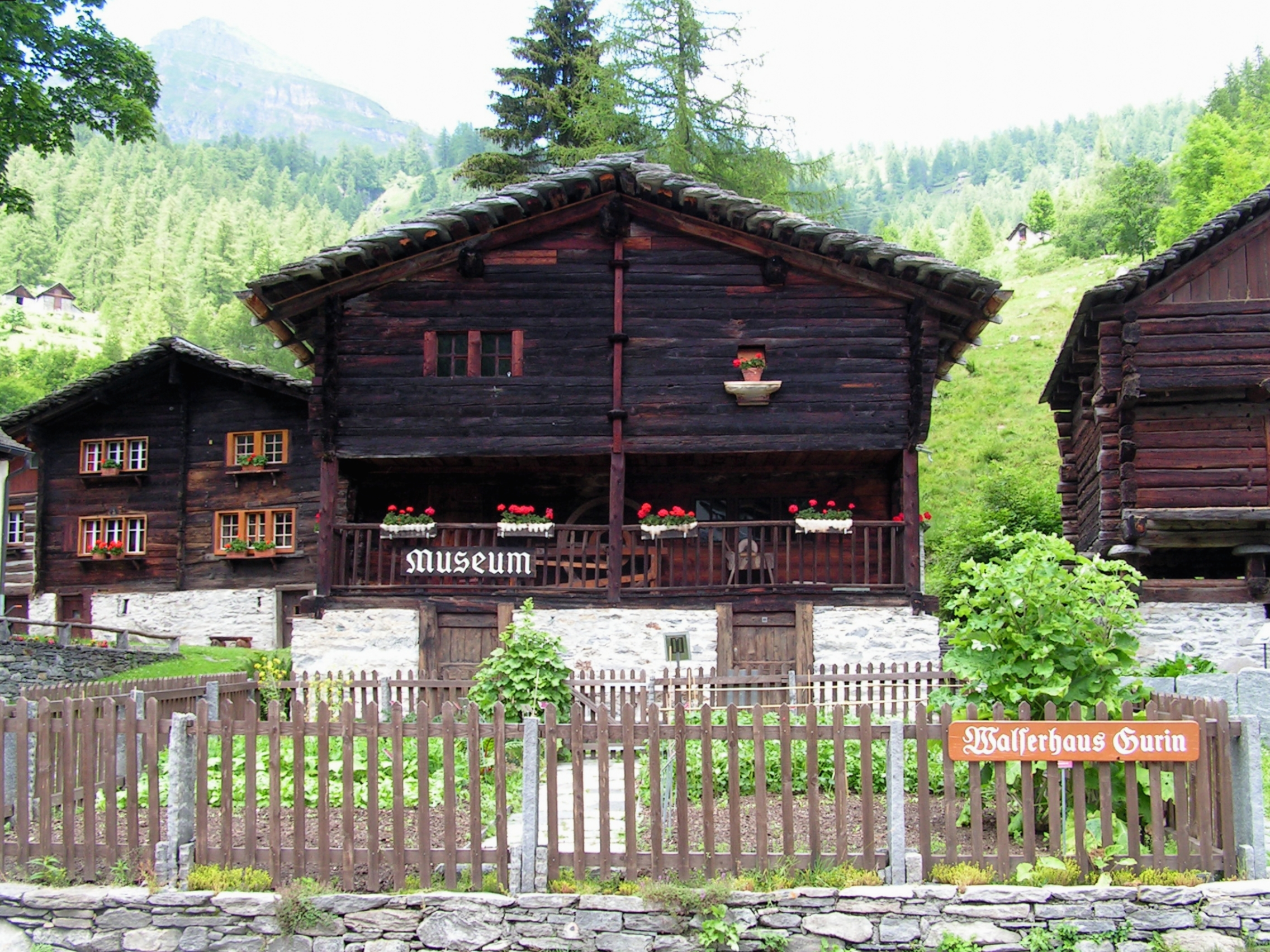 Le musée Walserhaus à Bosco Gurin avec le jardin des variétés traditionelles.